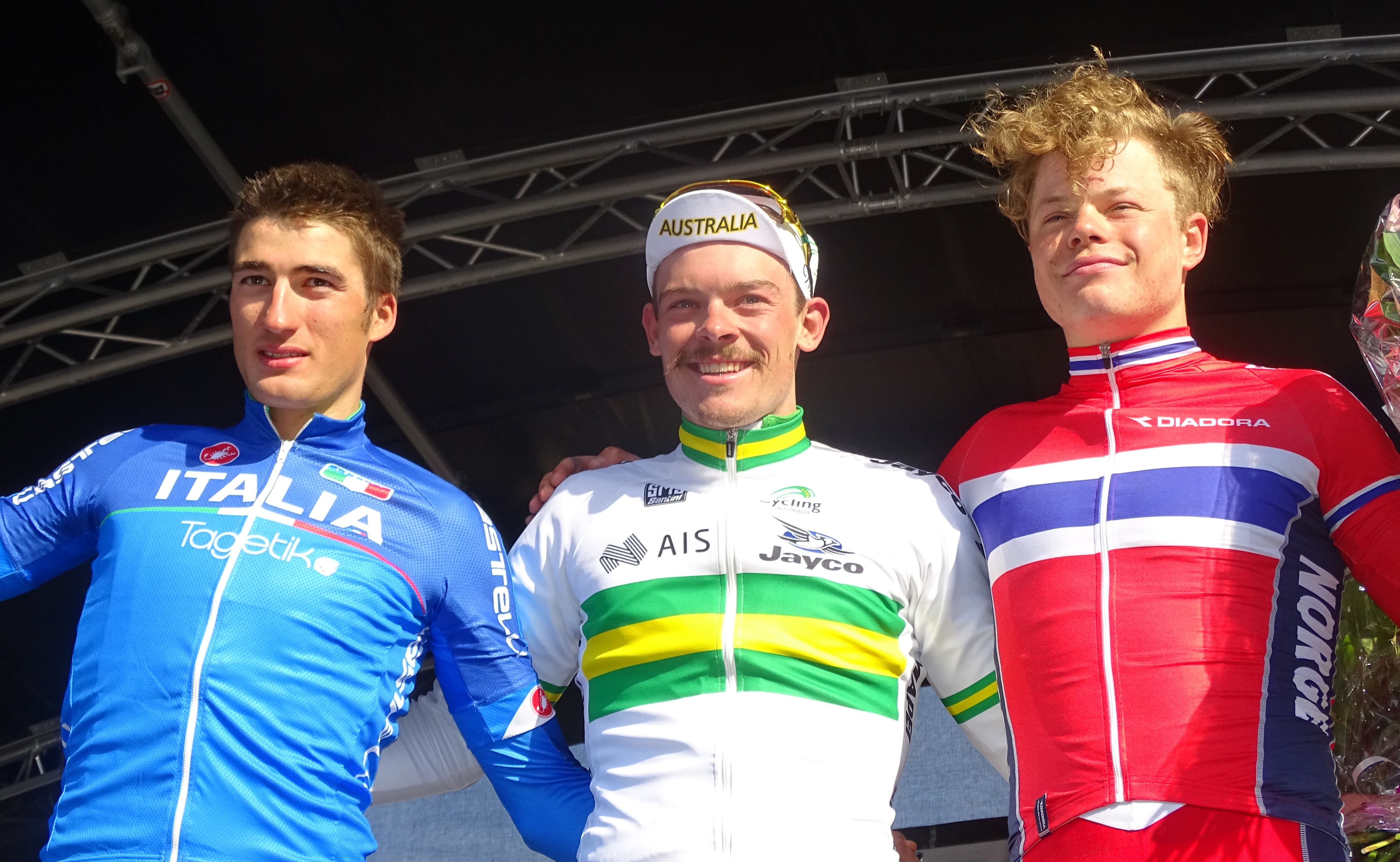 Reportage réalisé le samedi 11 avril à l'occasion du départ et de l'arrivée du Tour des Flandres espoirs 2015 à Audenarde, Belgique.